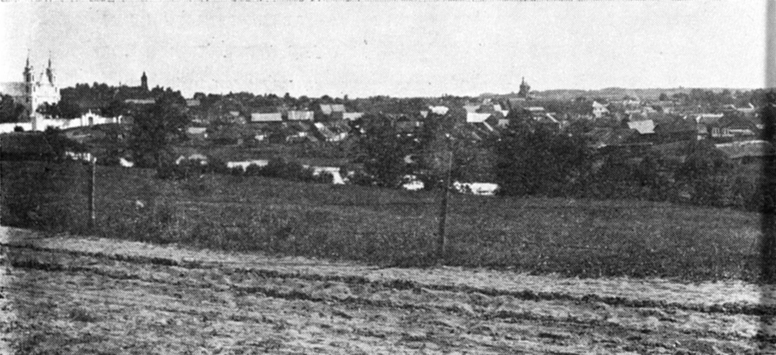 Беларуская (тарашкевіца): Івянец (Ivianiec), рака Волма (Vołma)